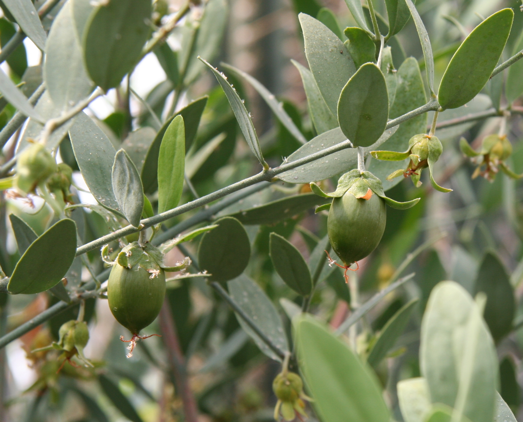 Simmondsia chinensis im Botanischen Garten Dresden